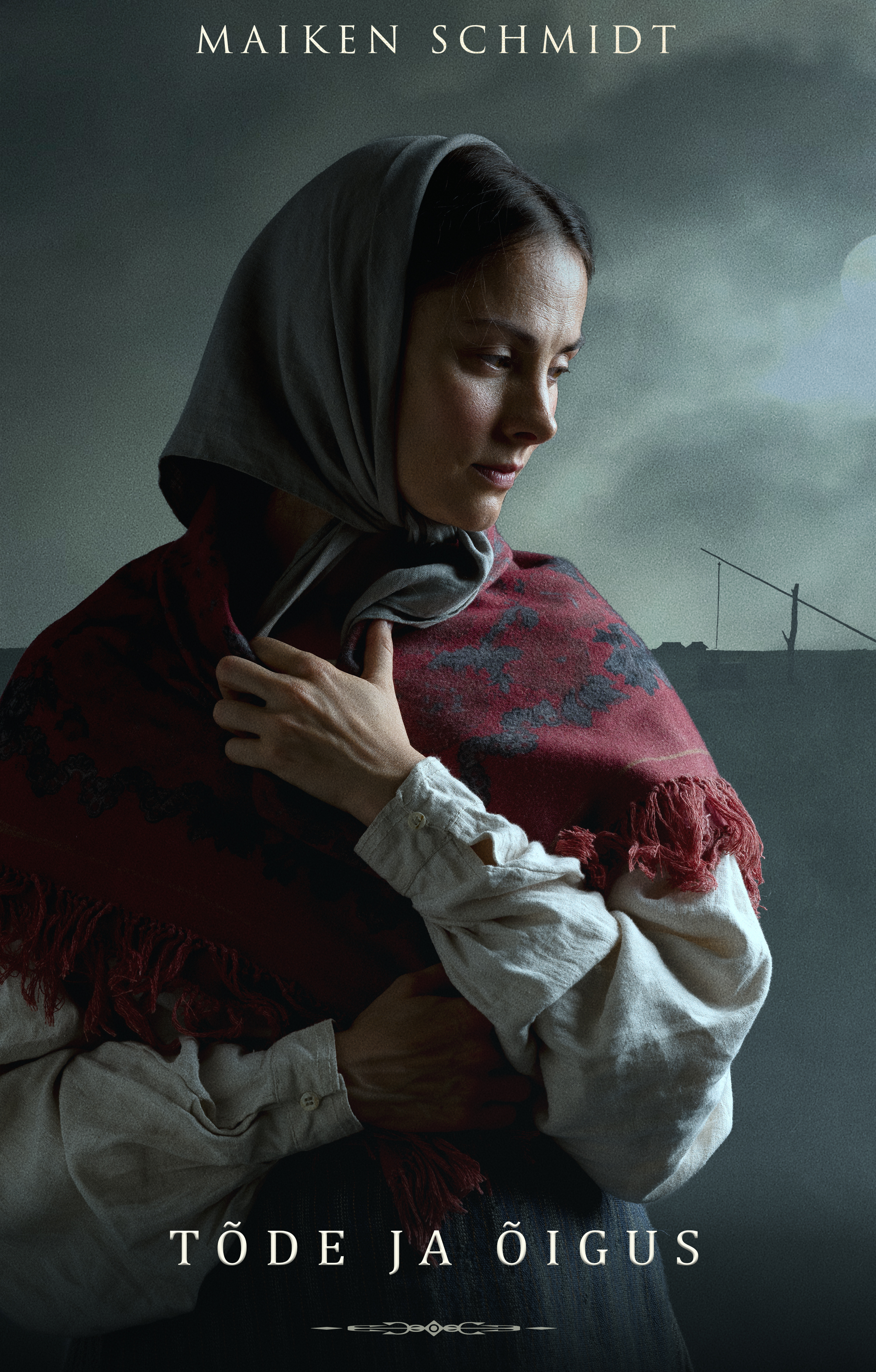 Maiken Pius (end. Schmidt) filmis "Tõde ja õigus" Krõõda osatäitjana